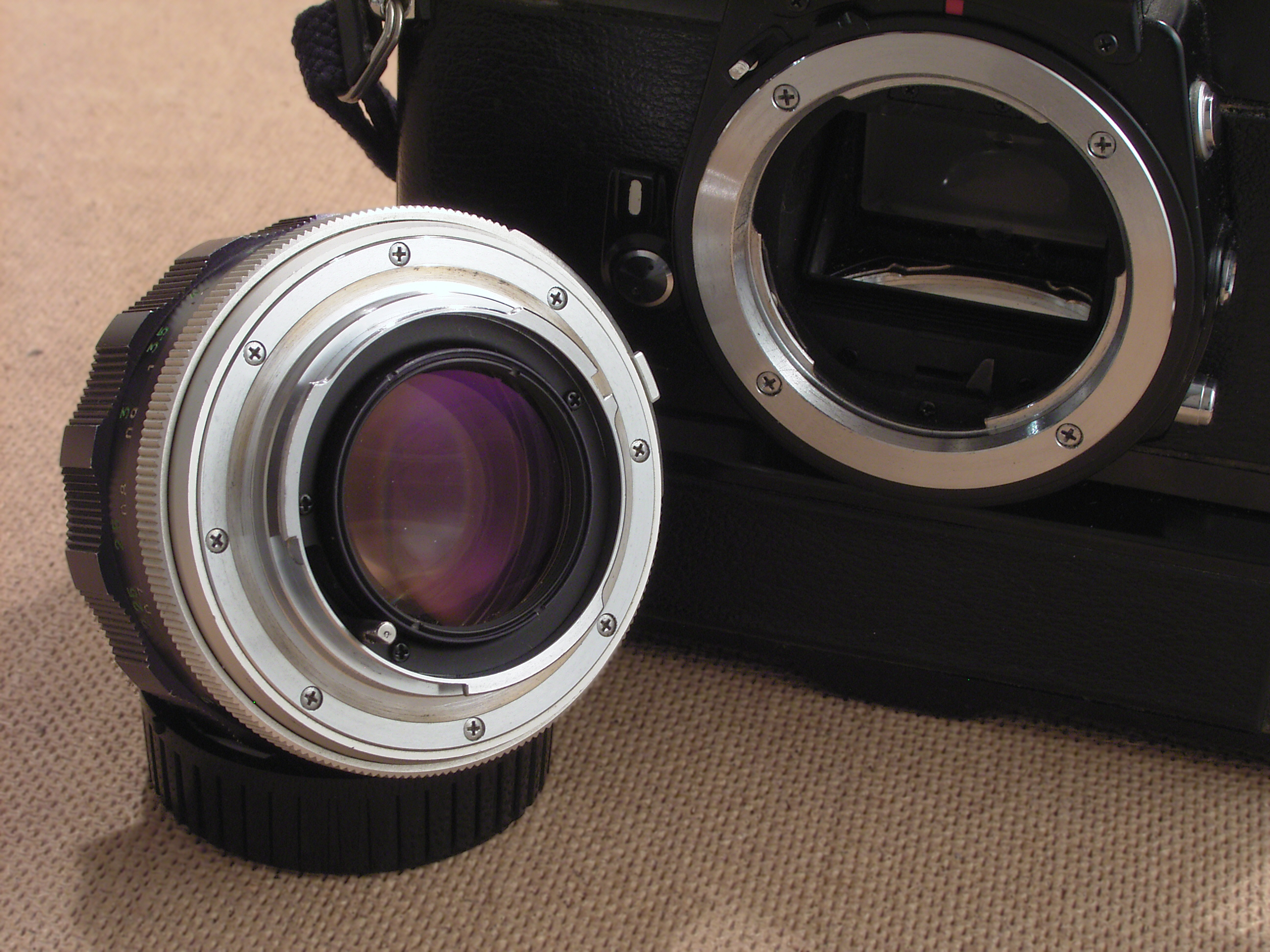 Objektivbajonett eines Kamerasystems mit manuellem Fokus. Minolta XD-7, Minolta MC-Rokkor 1:1.4/58mm Normalobjektiv